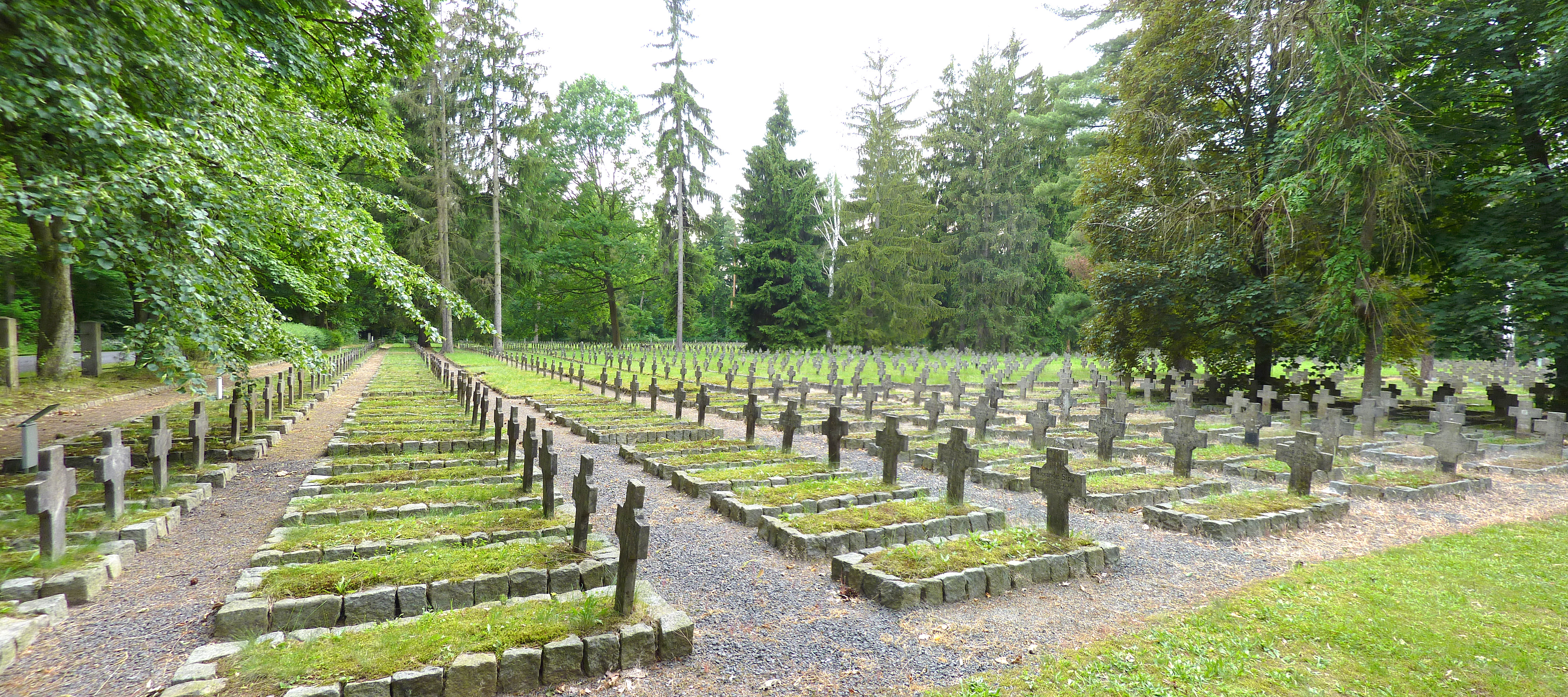 Widok Starego Cmentarza Jenieckiego w Łambinowicach - kwatery z okresu I wojny światowej